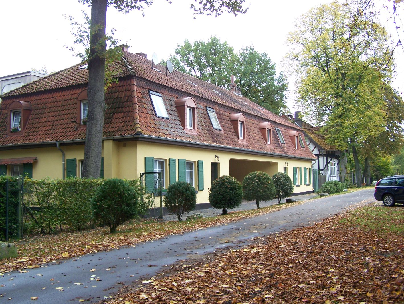 Das Gut Rixförde